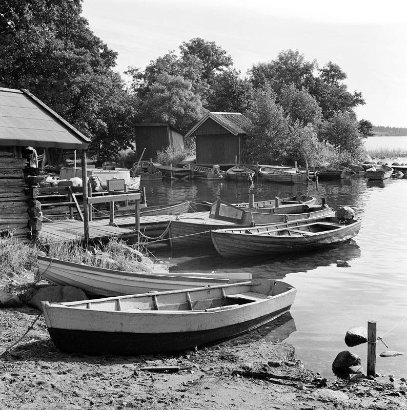 Mindre fiskehamn vid Rävsnäs, Rådmansö, Norrtälje kommun på 1960-talet med sjöbodar, bryggplatser och den vanliga typen av roddbåtar i trä som användes av sommargäster, ofta försedd med "moderniteten" utombordsmotor.